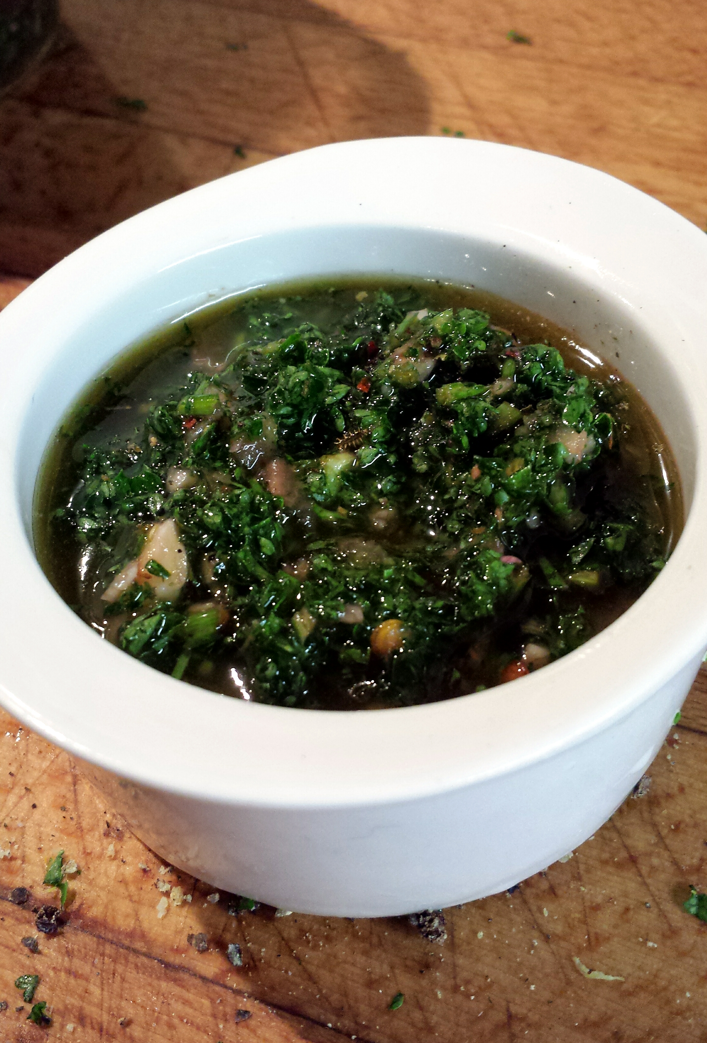 Chimichurri Sauce Recipe Chimichurri sauce preparation